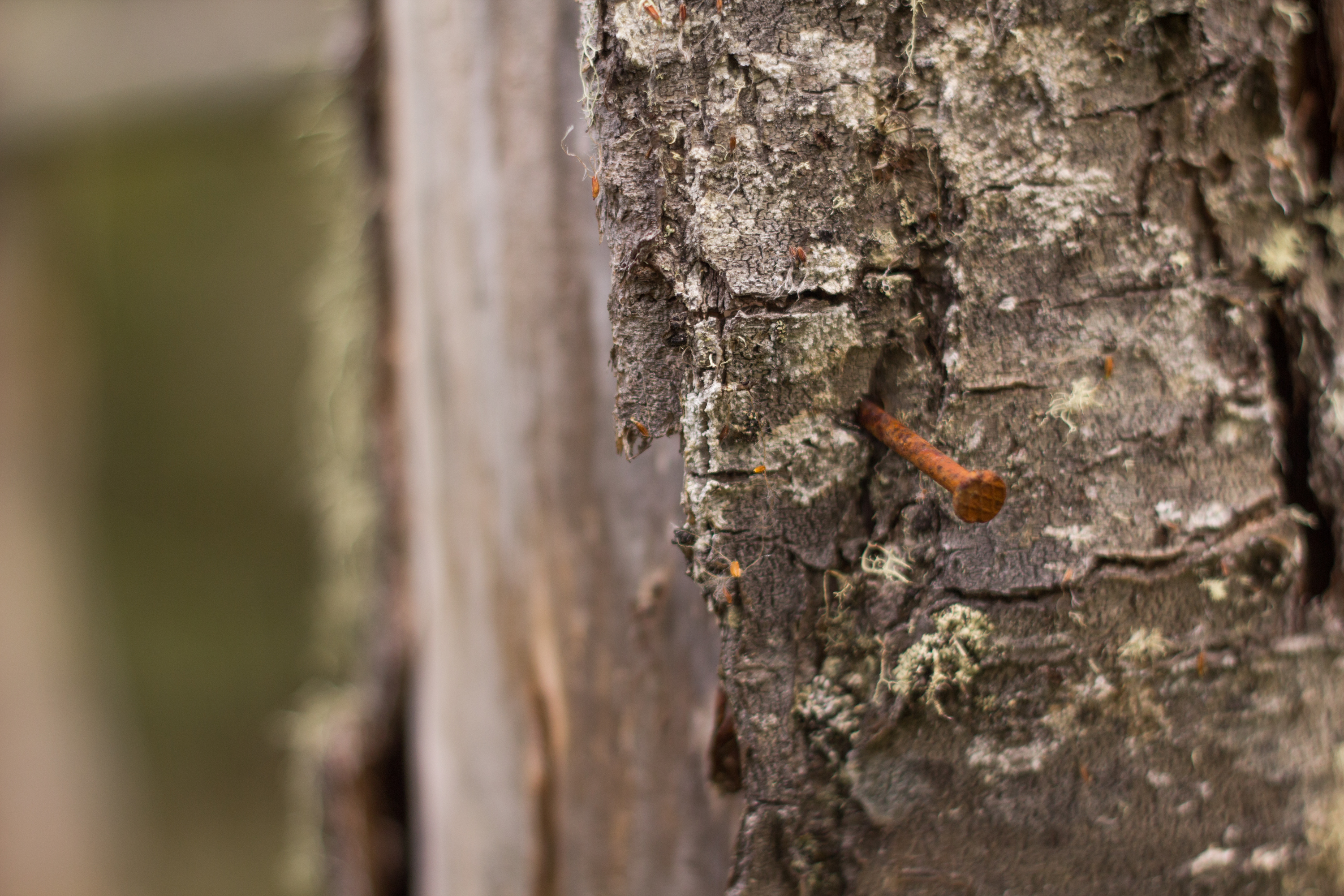 Una lenga patagonica sobreviviendo a la intervencion humana